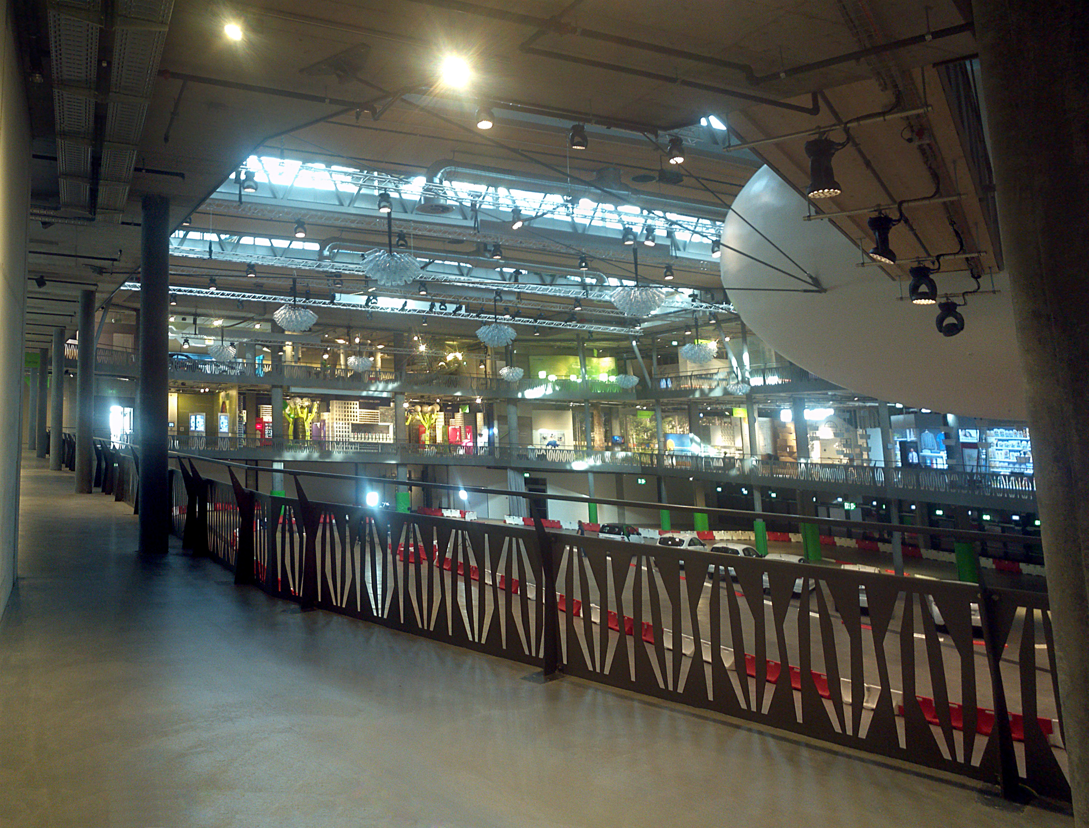 Umweltarena Spreitenbach AG, Innenansicht